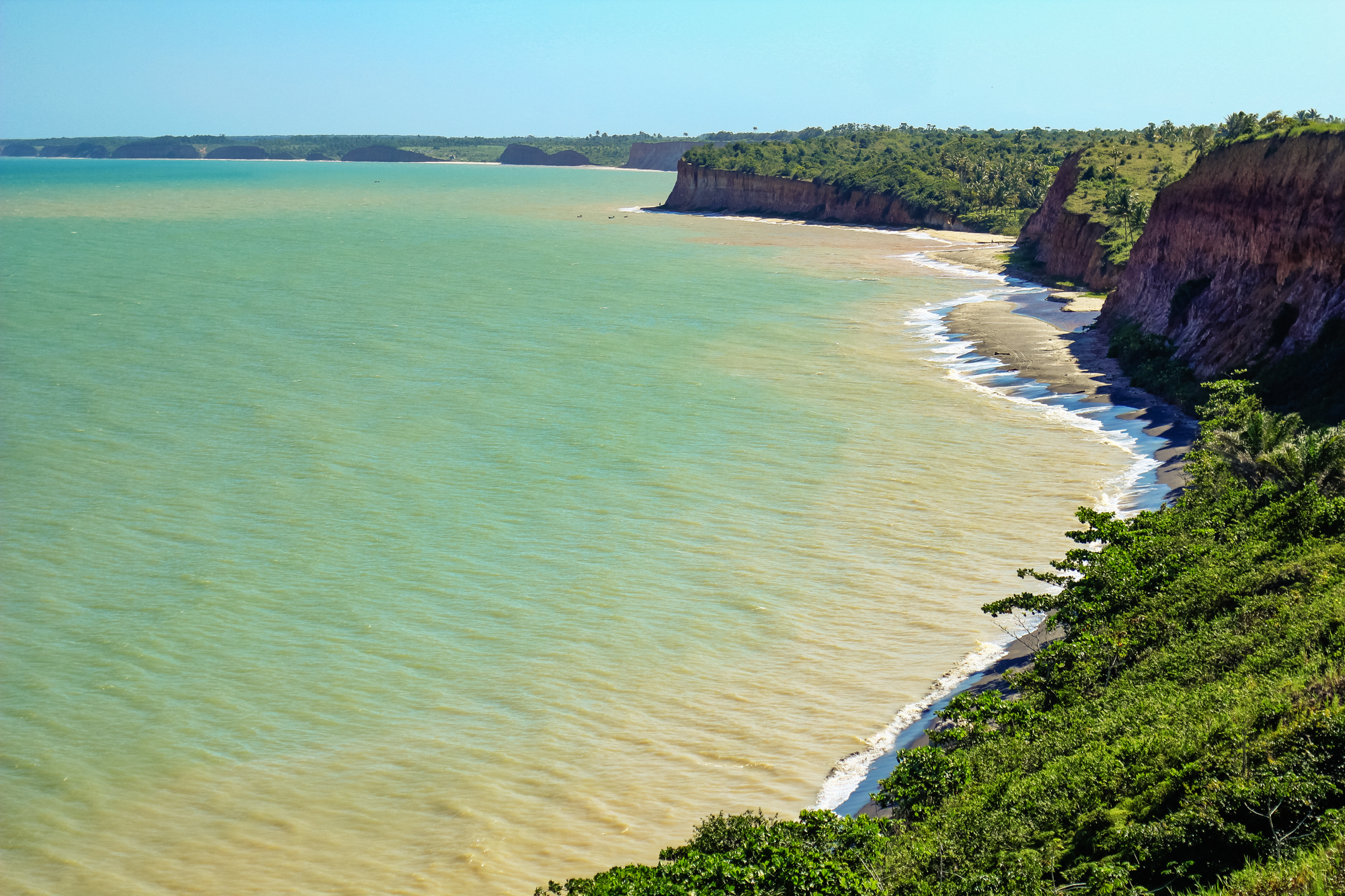 Cumuruxatiba - BA